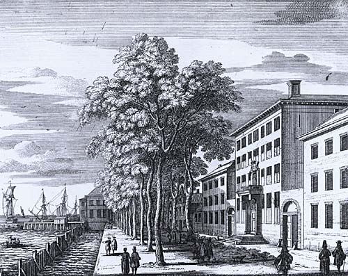 from "Atlas van Stolk"